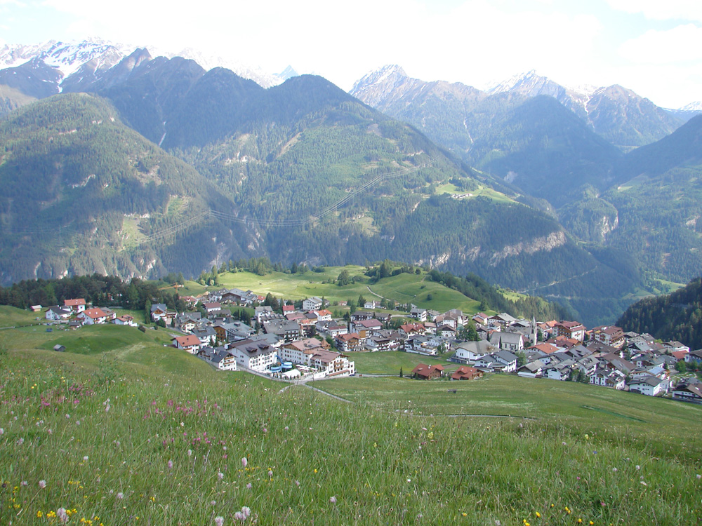 Serfaus im Sommer